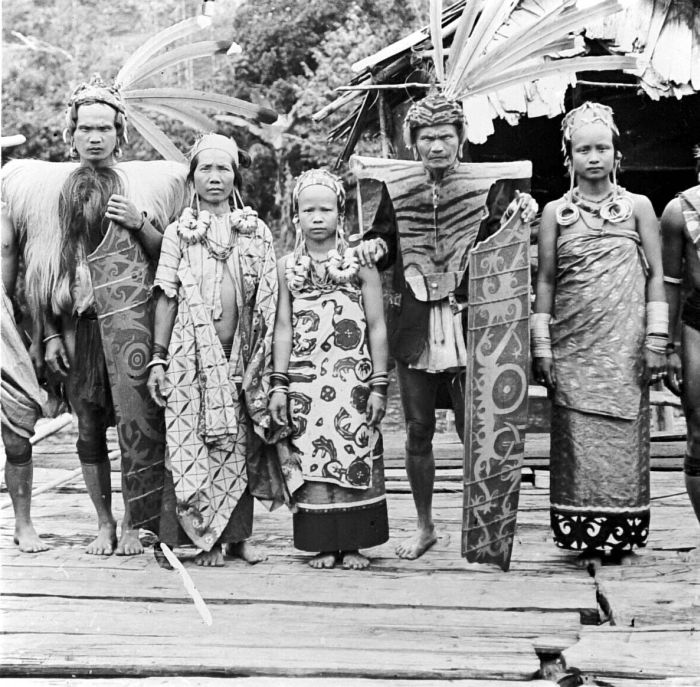 Repronegatief. Een groep Dajaks uit Màh Koelit, Borneo